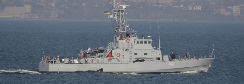 «Старобільськ» (до 2019 року — «Драммонд»; англ. WPB-1323 «Drummond»)